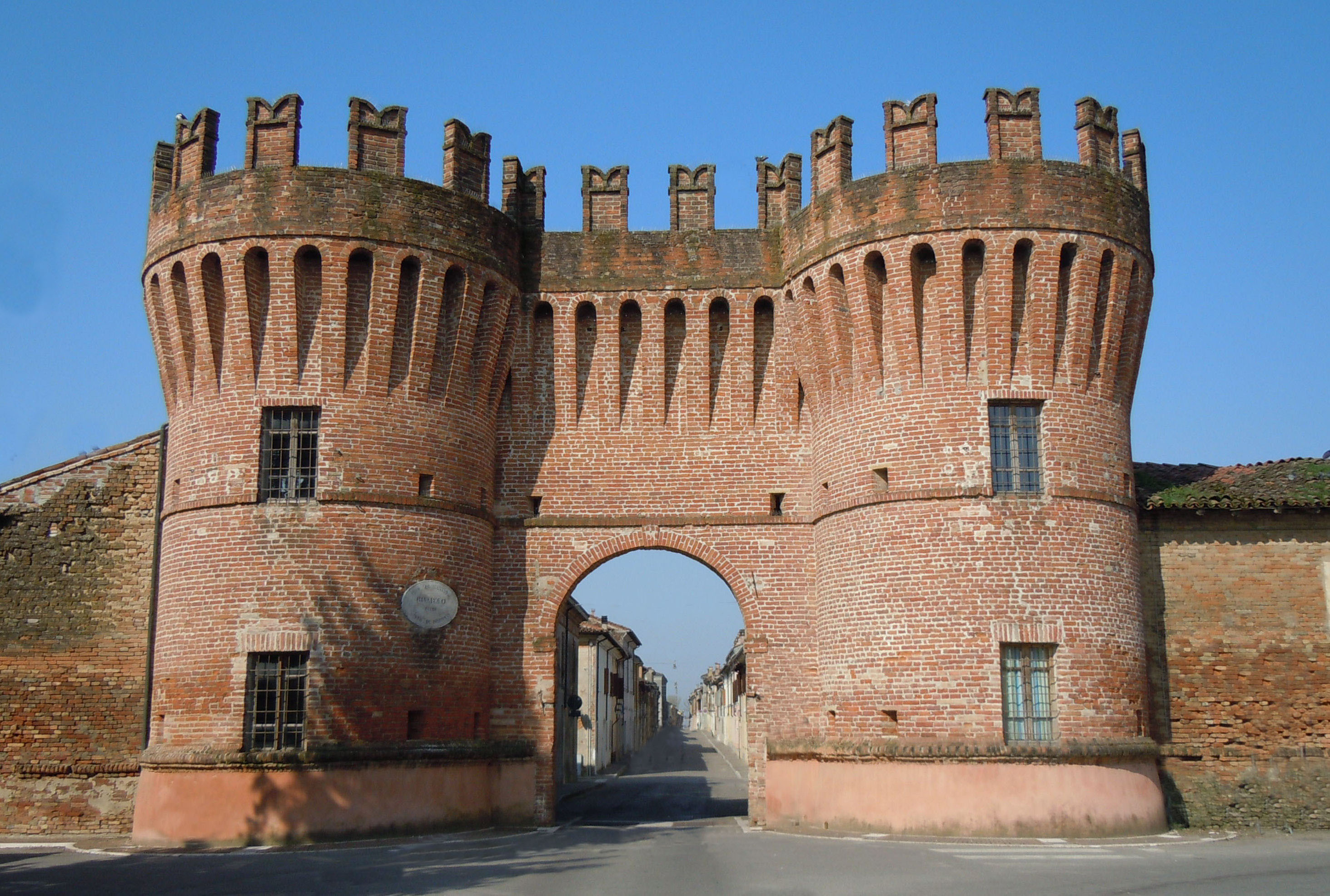 Rivarolo Mantovano, porta di ingresso al paese.